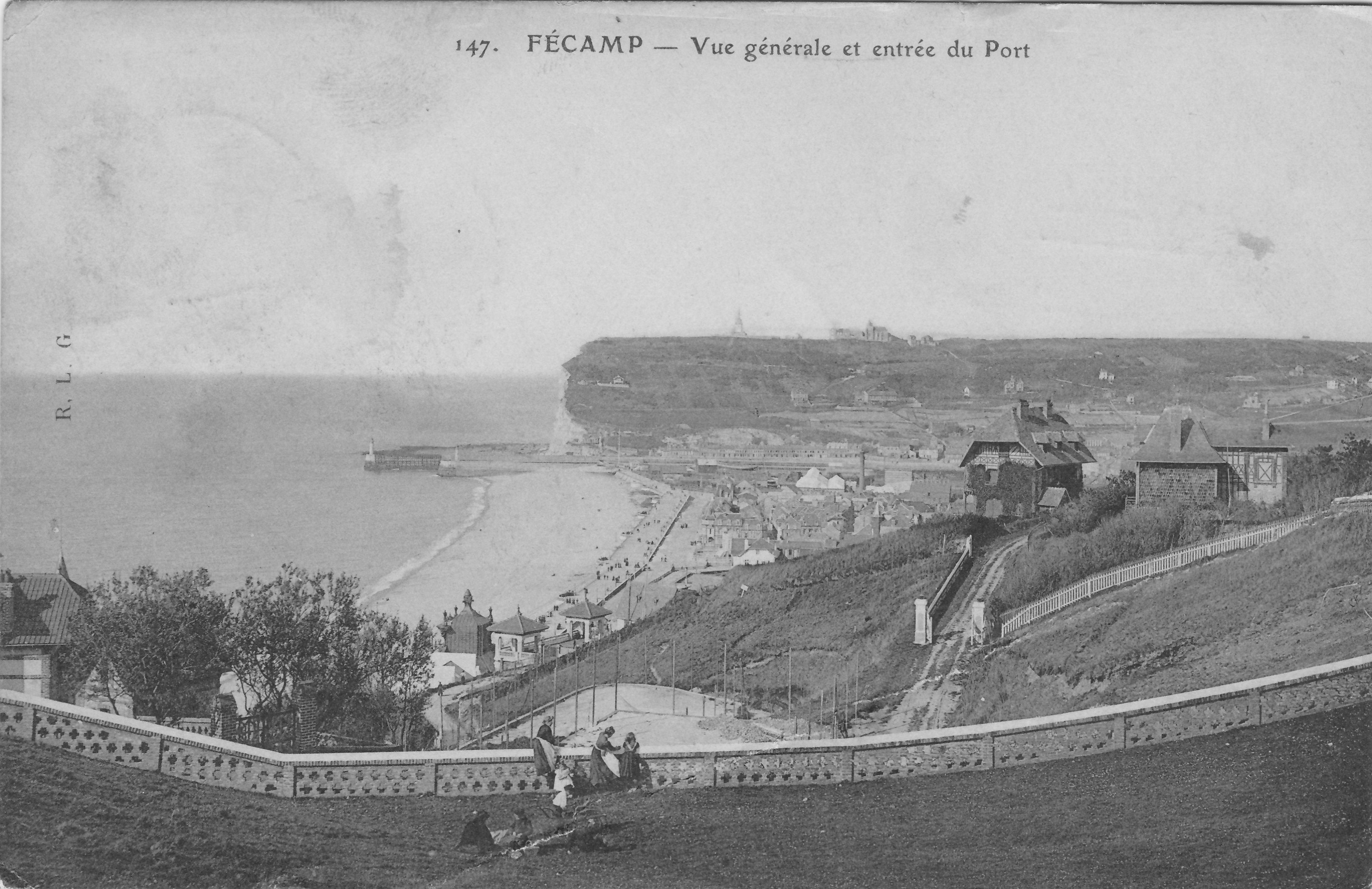 Carte postale ancienne montrant le port de Fécamp vers 1914